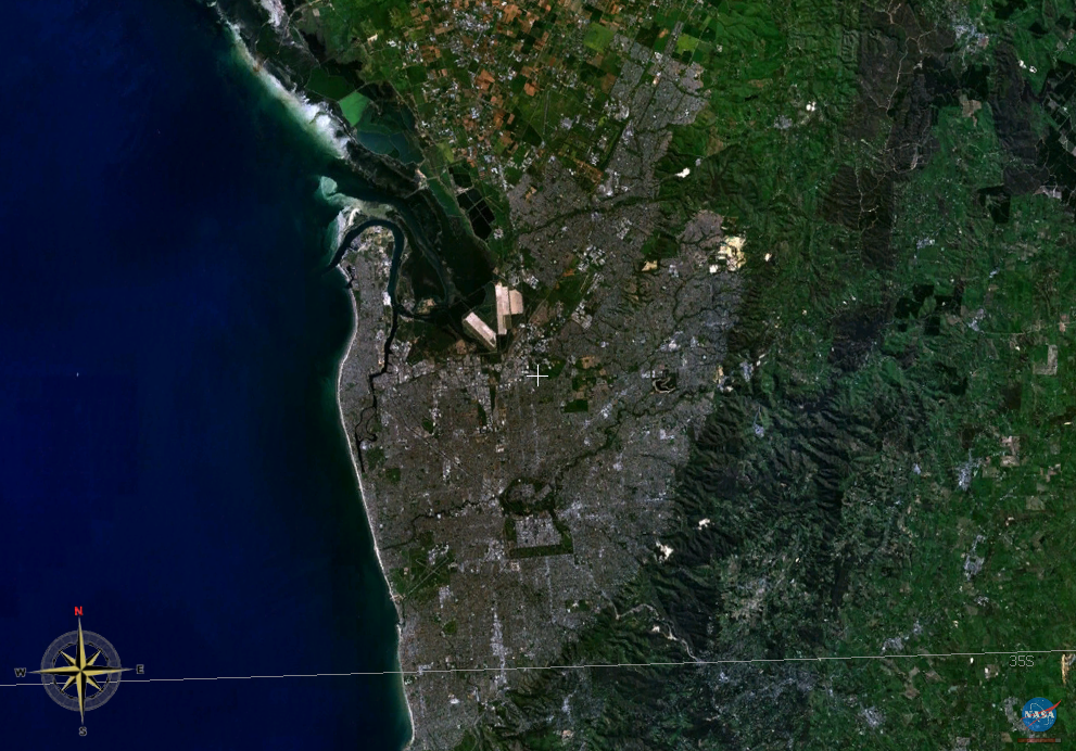 Satellite image over Adelaide Metropolitan area